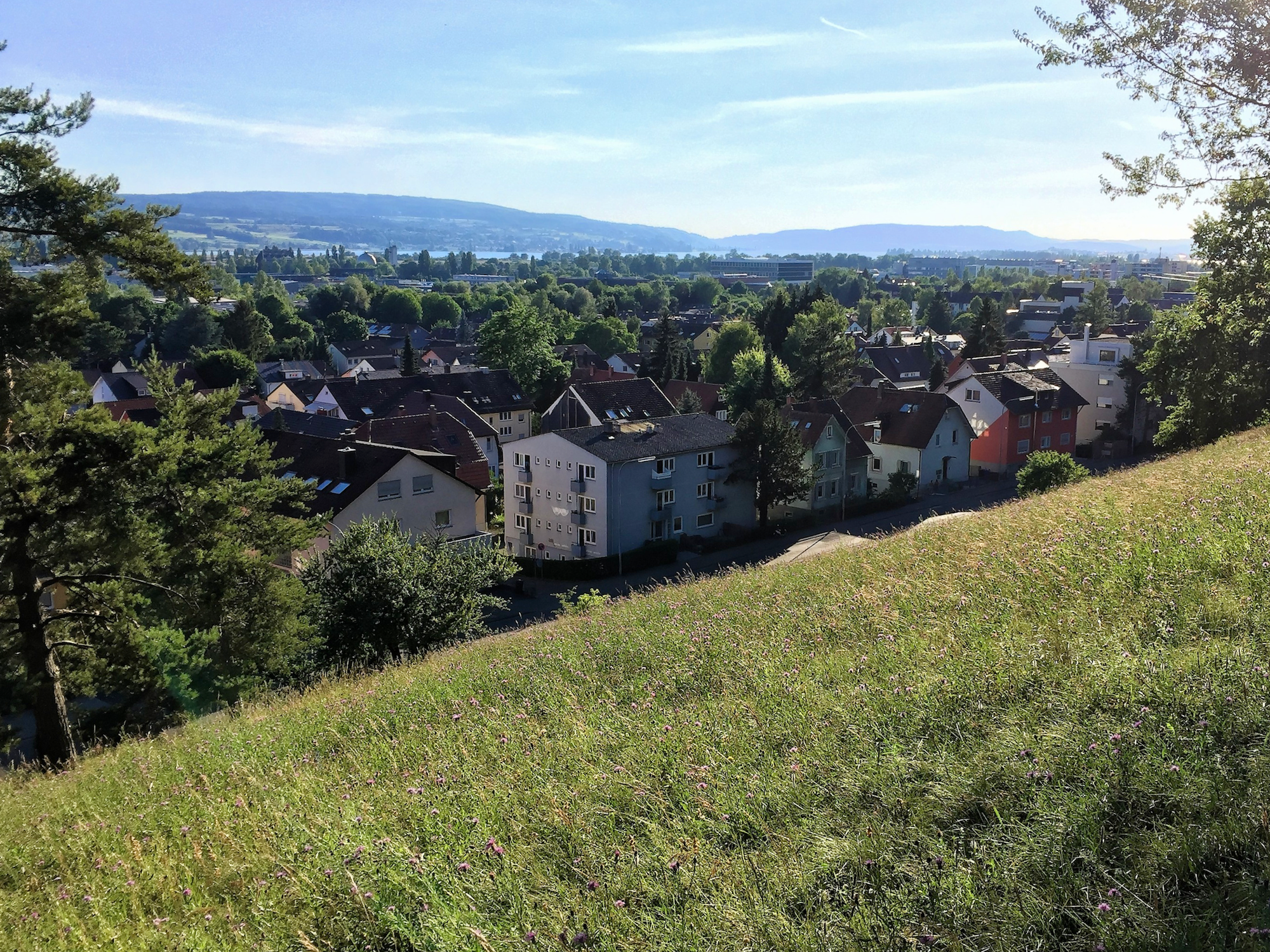 Der Ausblick über den Konstanzer Stadtteil Fürstenberg vom Fürstenberg aus.